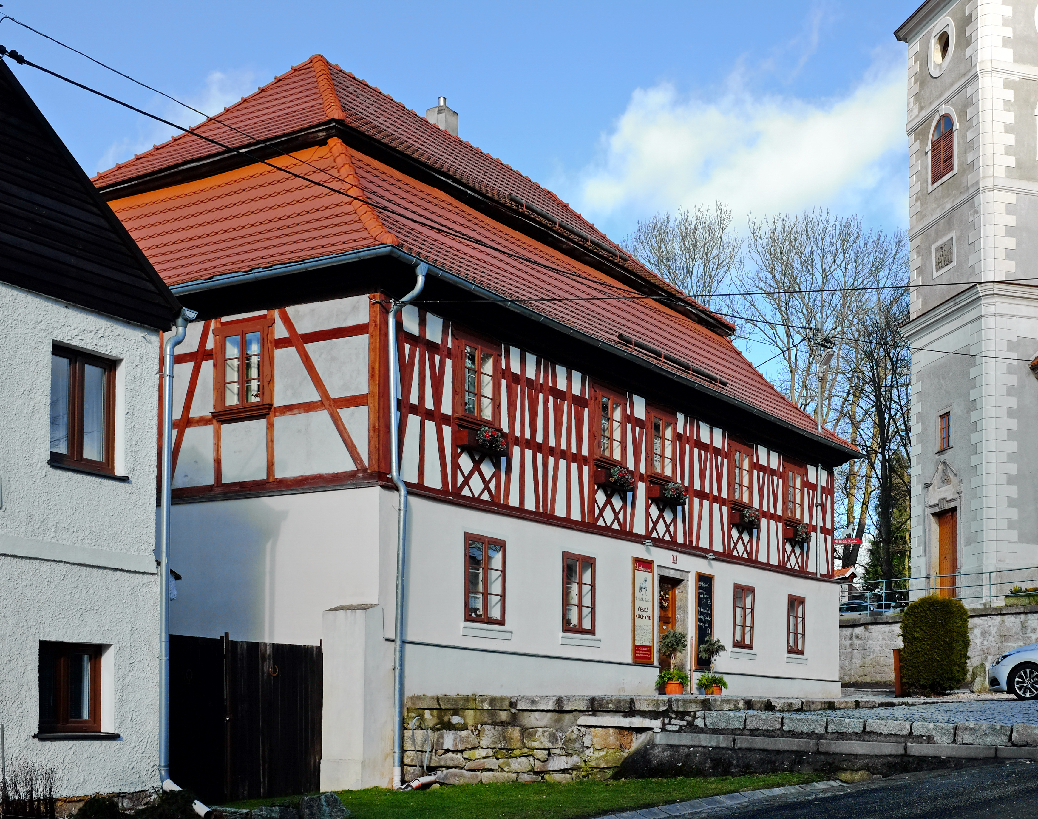 Kostelní Bříza, Zartnerův hostinec čp. 16, okres Sokolov